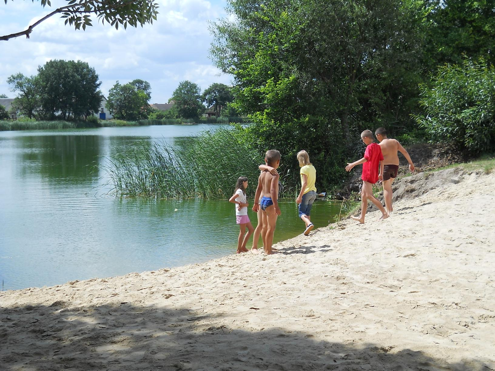 Wojcieszyce. Plaża.